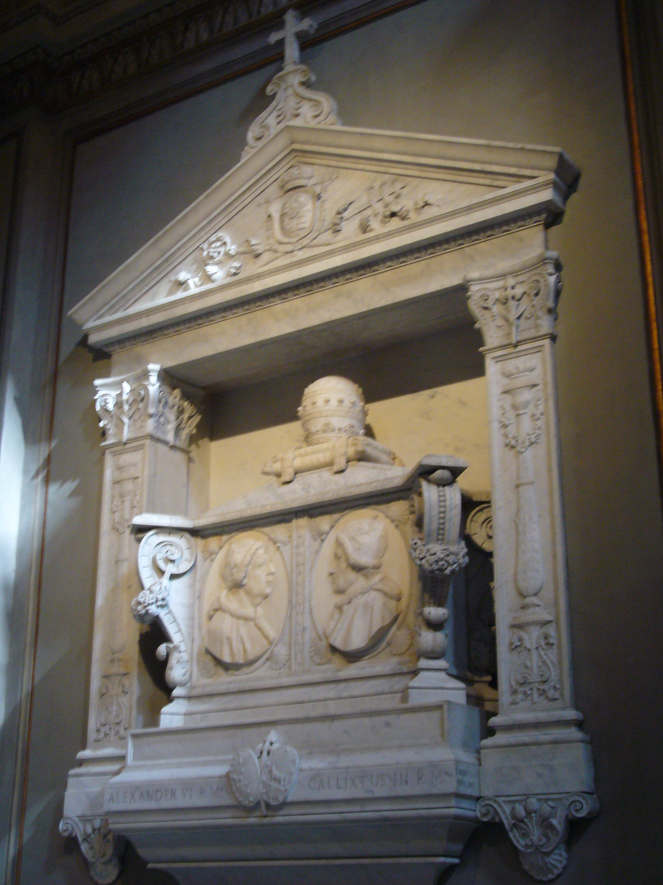 Roma, Santa Maria in Monserrato: tomba dei papi Borgia Callisto III e Alessandro VI nella prima cappella di destra